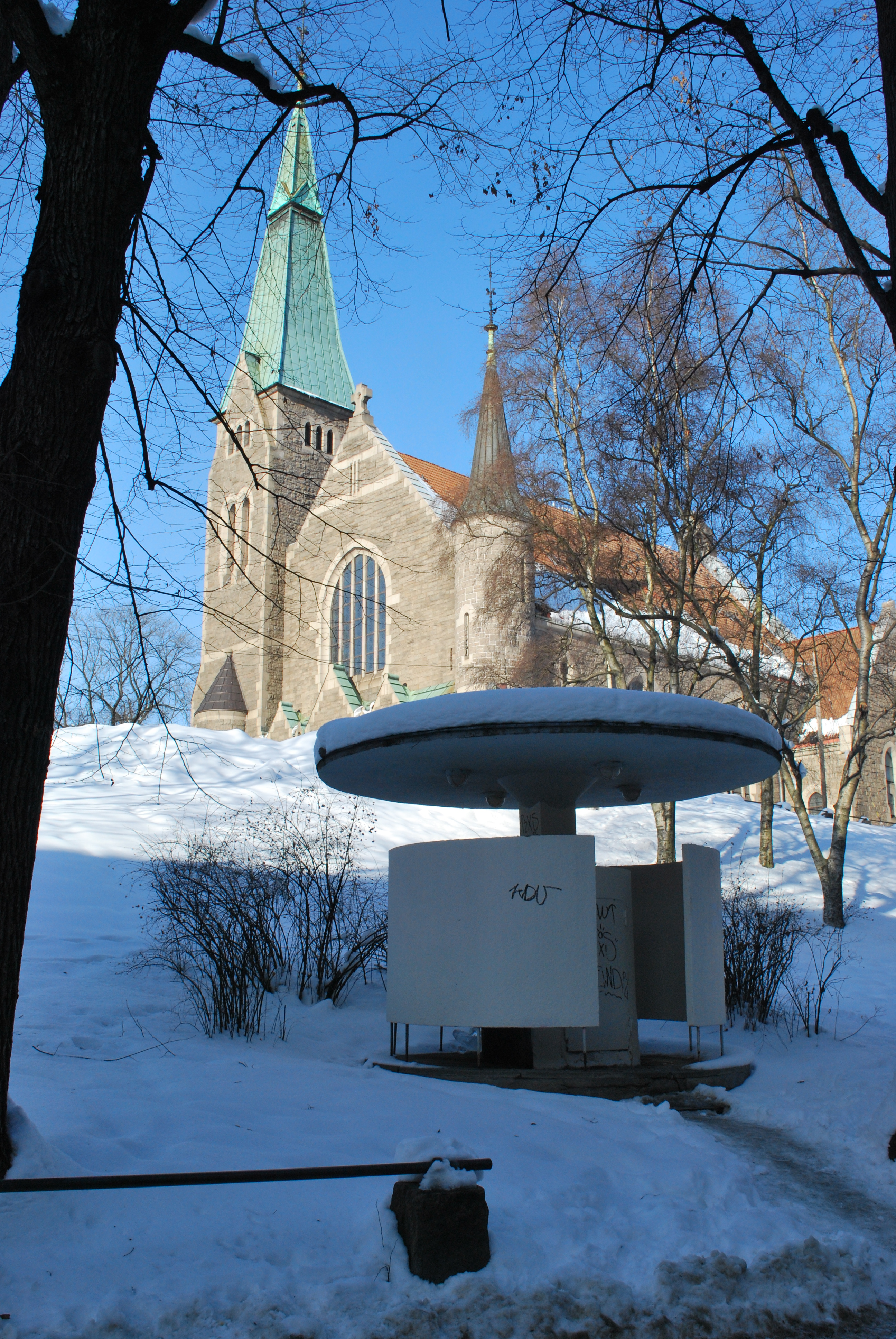 Urinalet med tilnavnet Kjærlighetskarusellen, Stensparken, Oslo, langs Sporveisgata